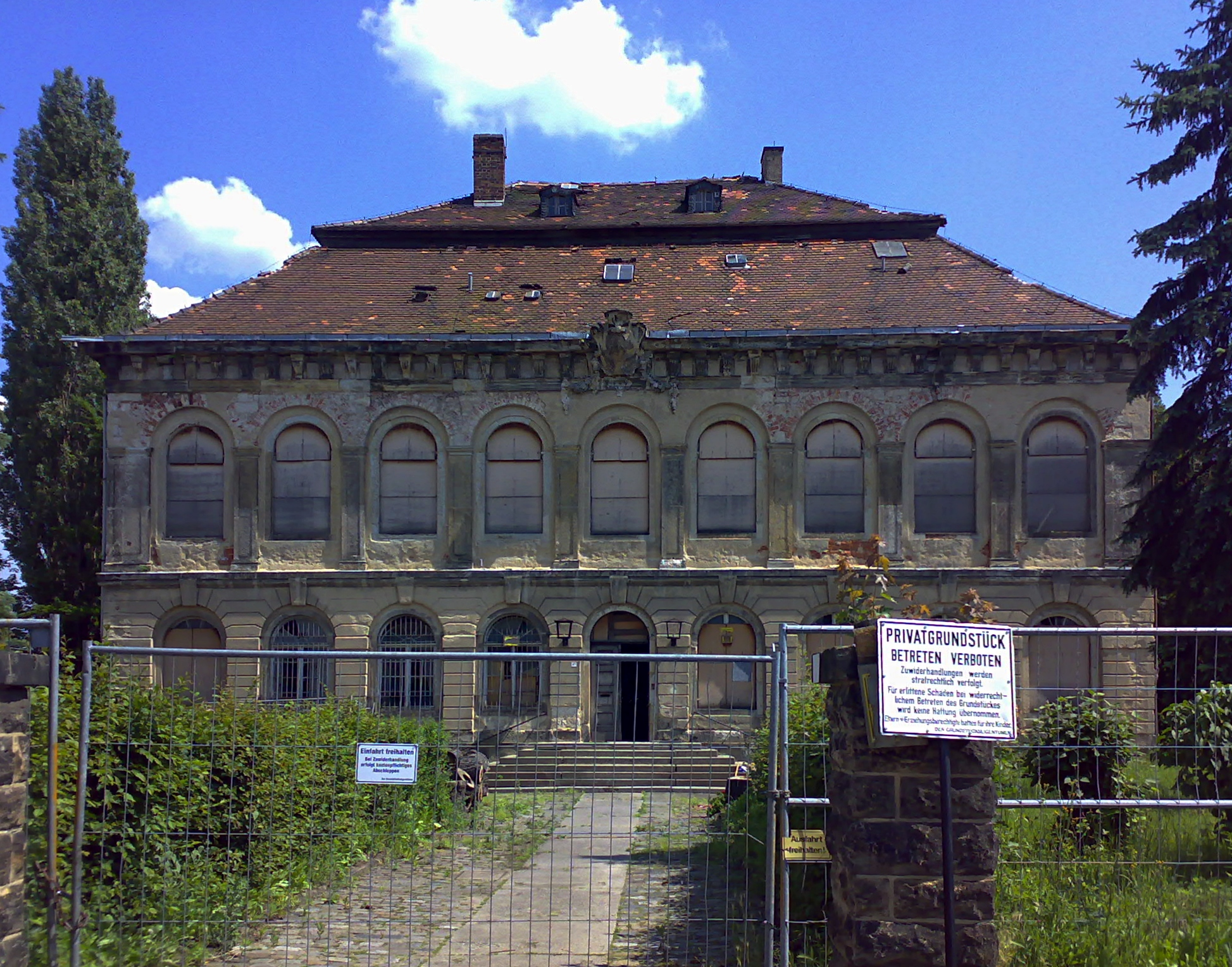 Schloß Übigau Frontseite, ehemaliger Verwaltungssitz der Maschinenbauanstalt Übigau